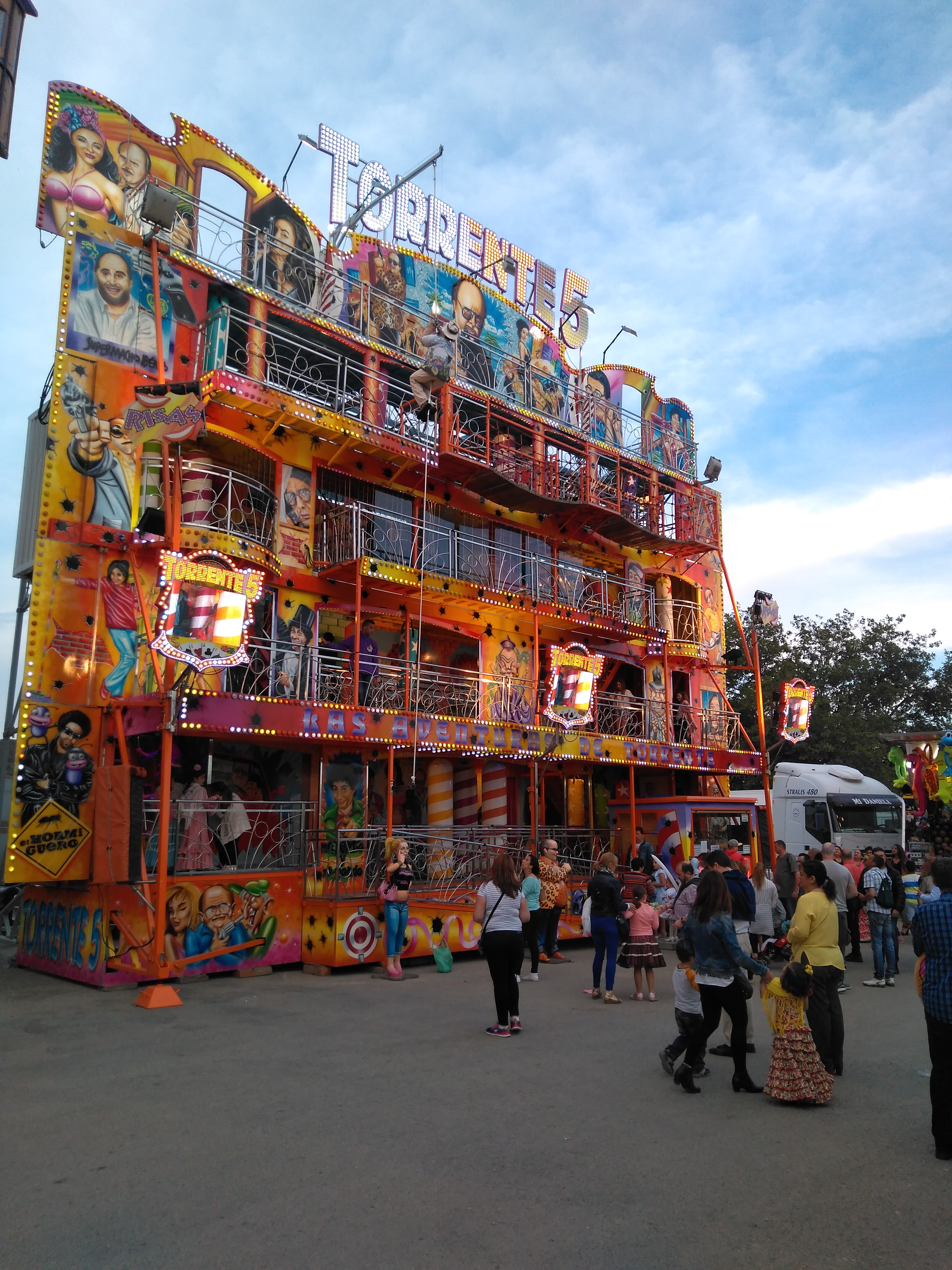 Atracción ambientada en Torrente 5 en la Feria del Caballo 2018